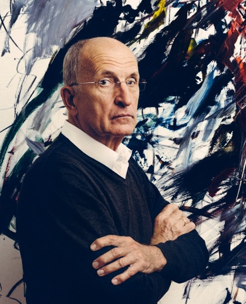 Portraitfoto von Erwin Guido Ortner